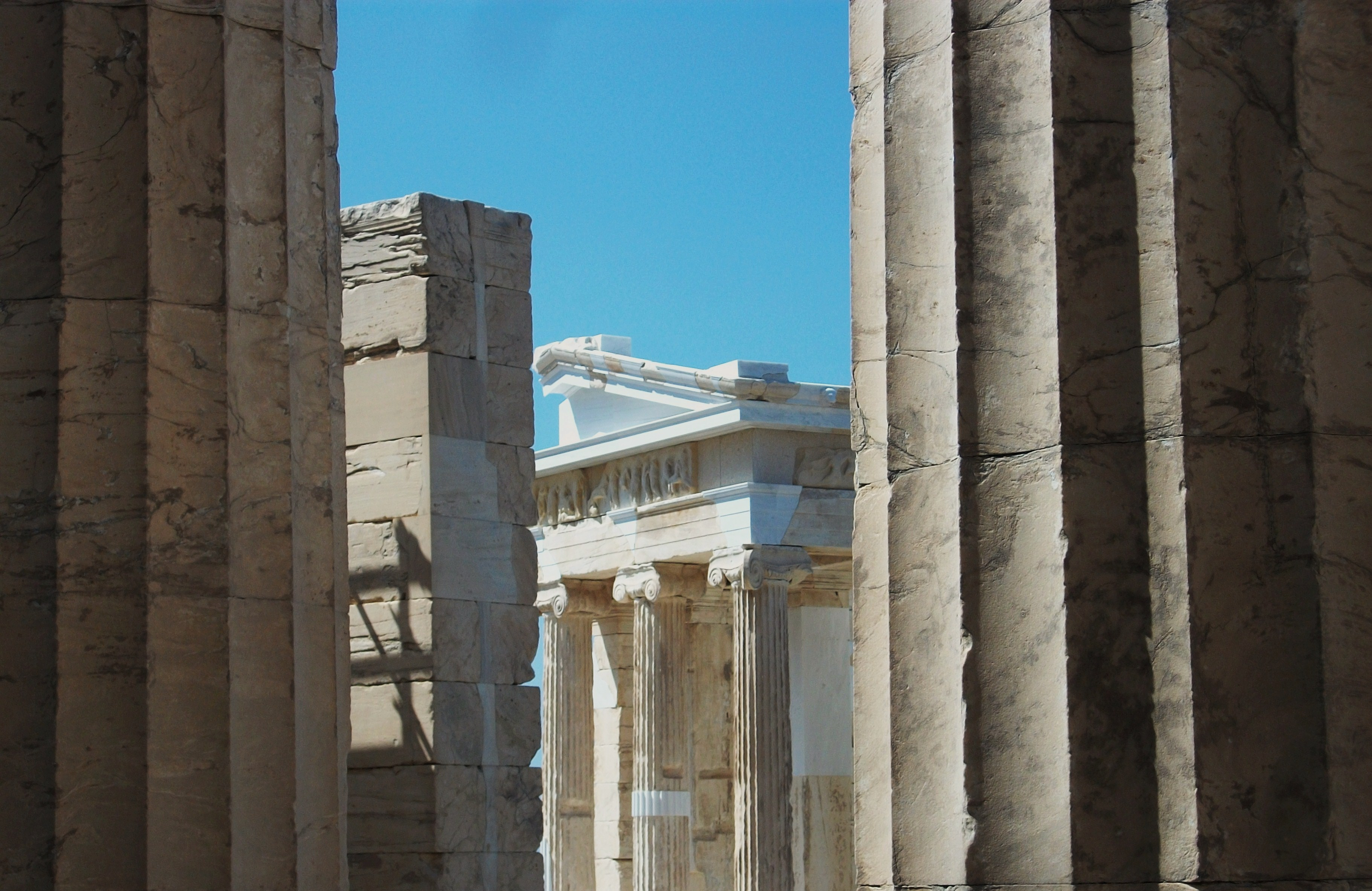 Temple d'Atena Nike a través dels pilars dels Propileus.